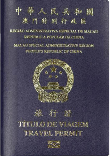 中文（中国大陆）: 澳门特别行政区旅行证封面